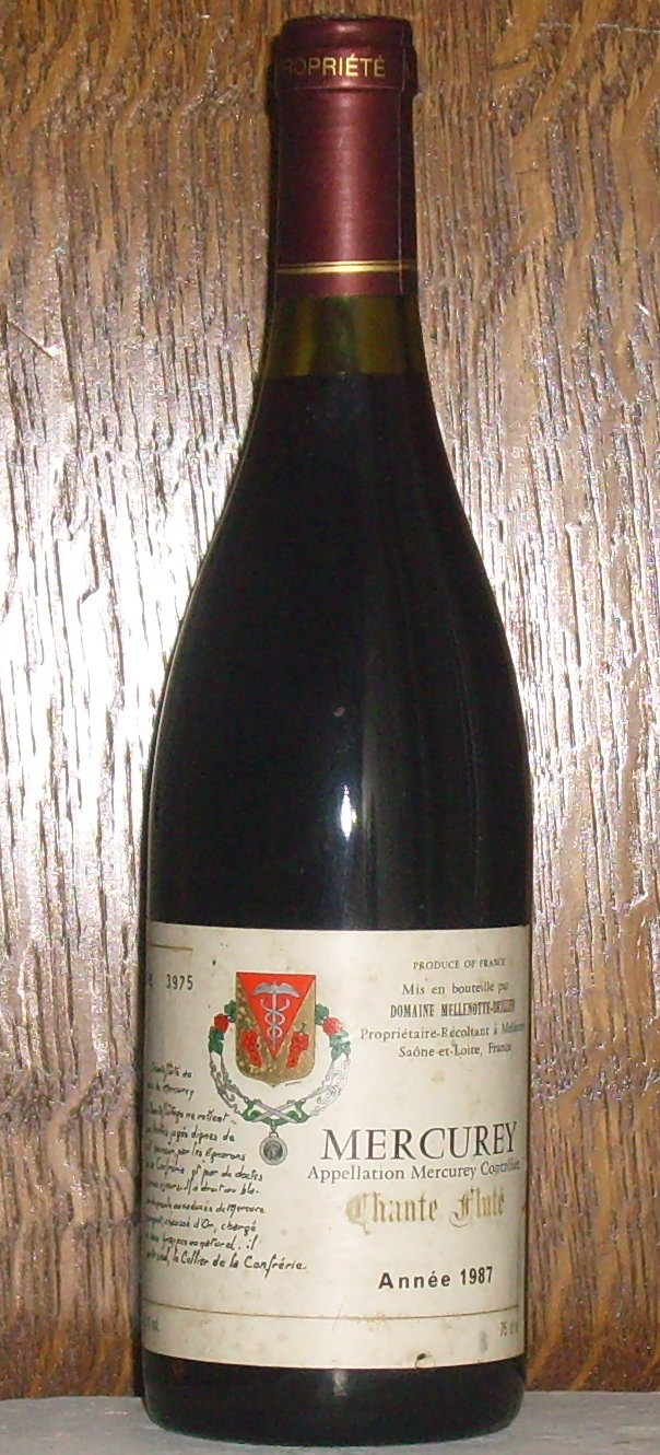 Bouteille de Mercurey Chantefluté